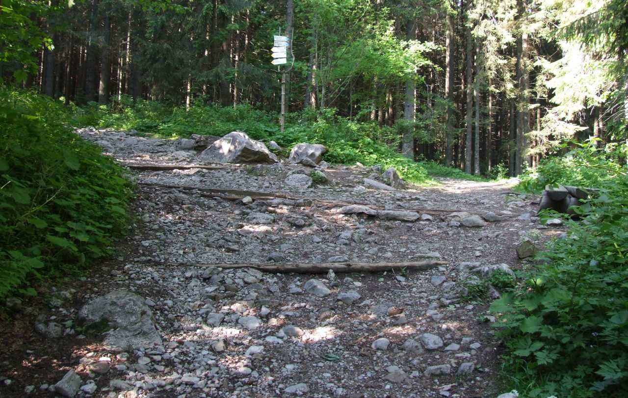 Szatra (rozdroże szlaków turystycznych w Dolinie Małej Łąki)